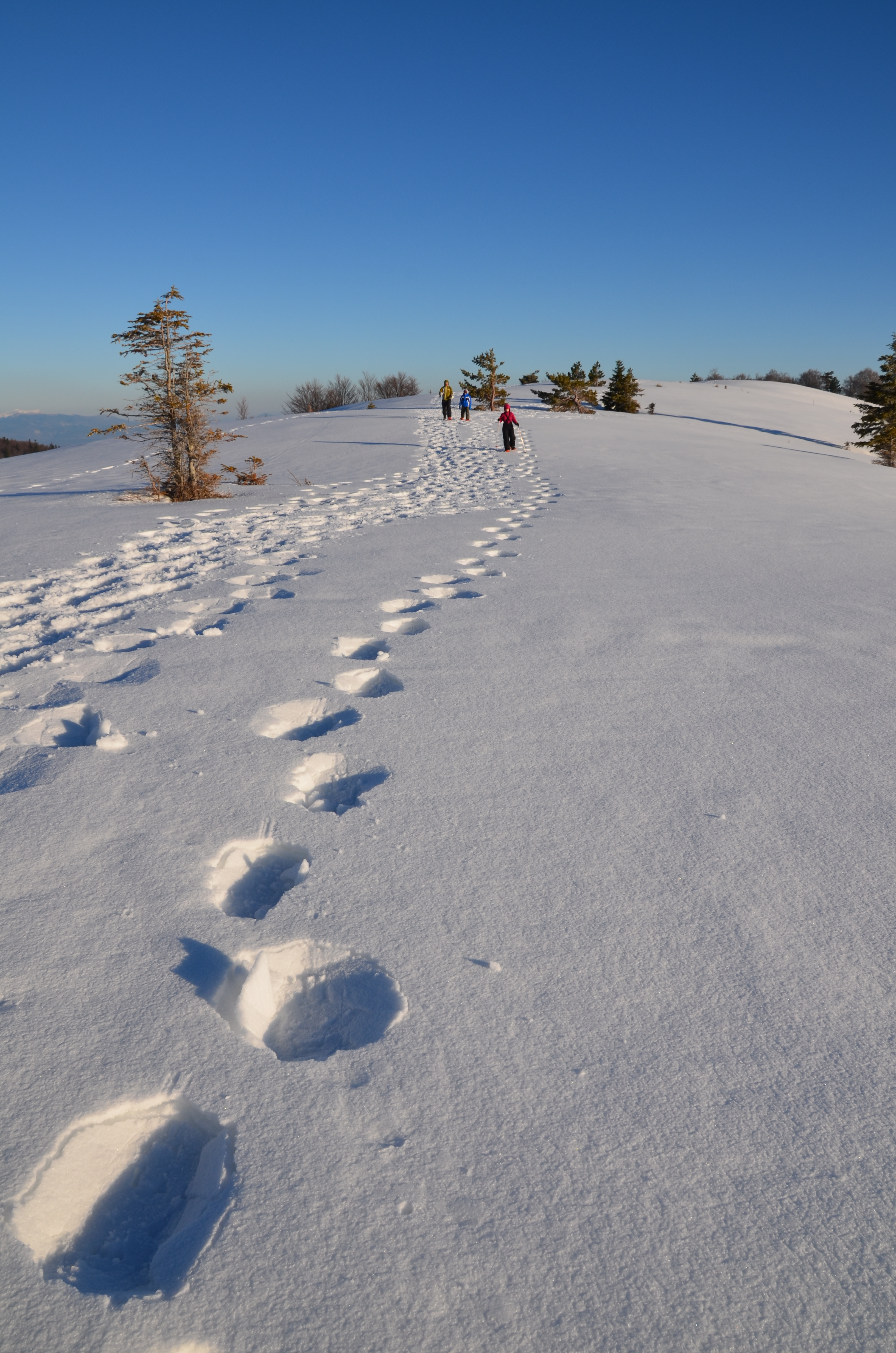 Ballade en raquette dans la montagne de Lure